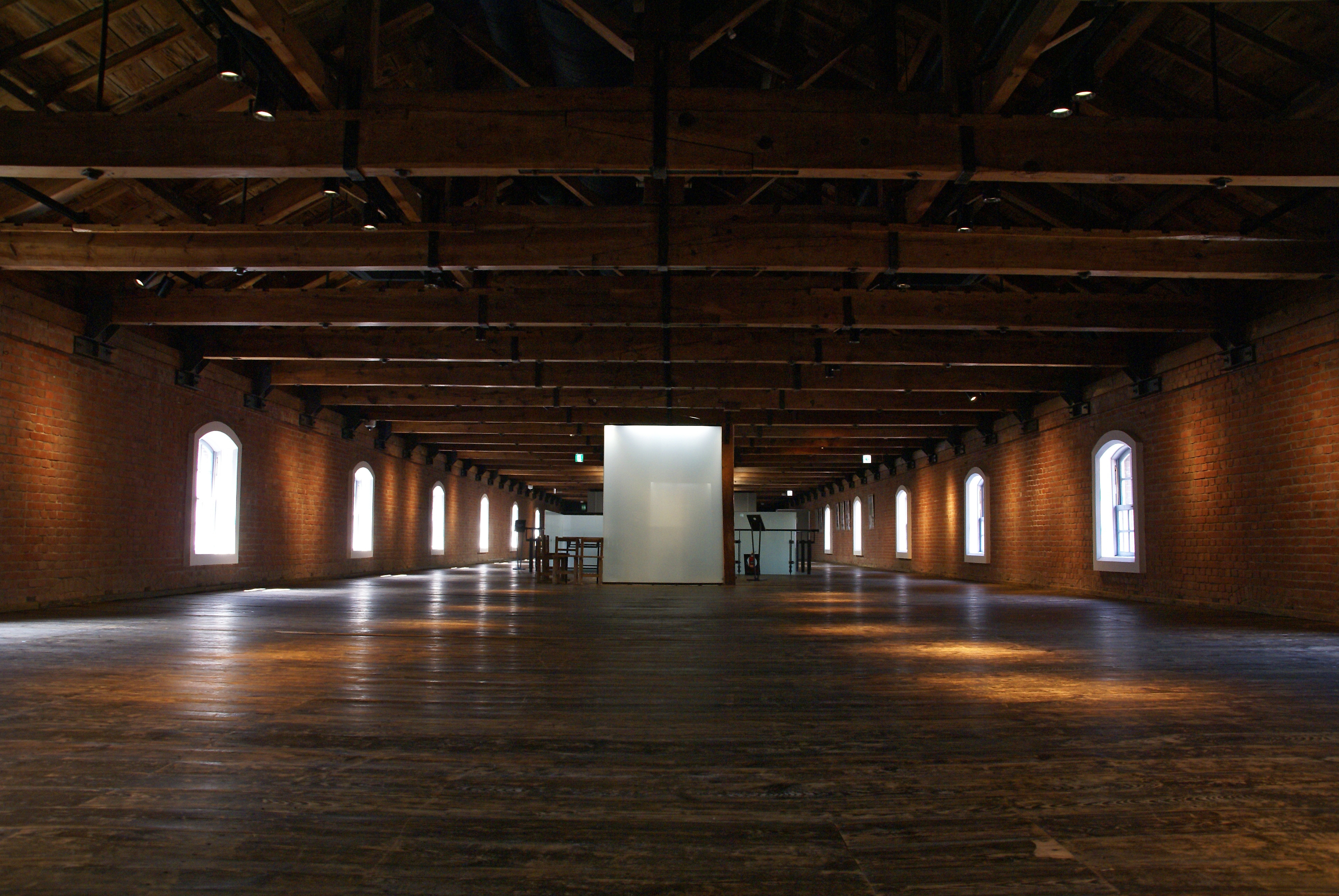 Maizuru Chiegura in Maizuru, Kyoto prefecture, Japan